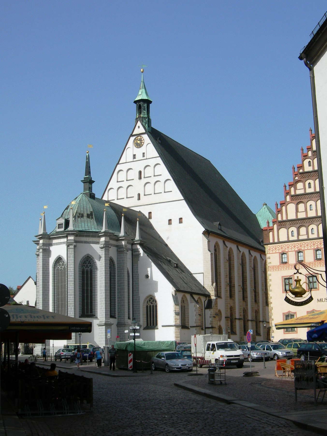 Freiberg, Dom from Untermarkt.